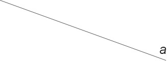 Tiesės žymėjimas brėžiniuose.